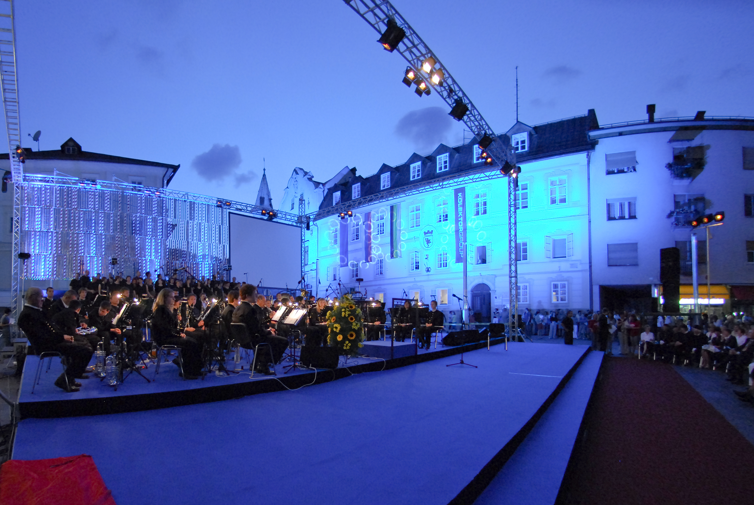 Festival idrijske čipke.